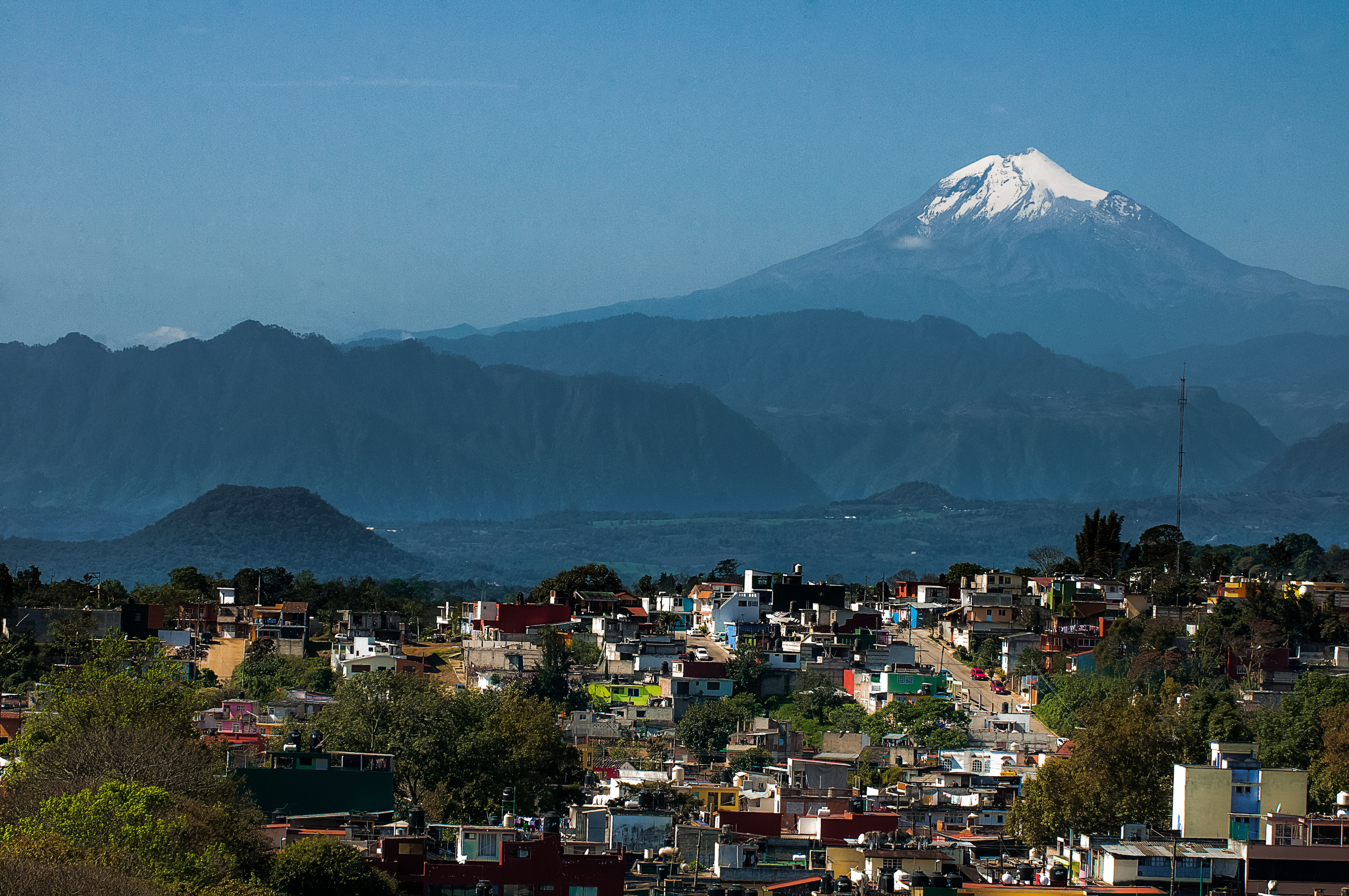 Vista del Pico de Orizaba desde Xalapa, Veracruz, México.